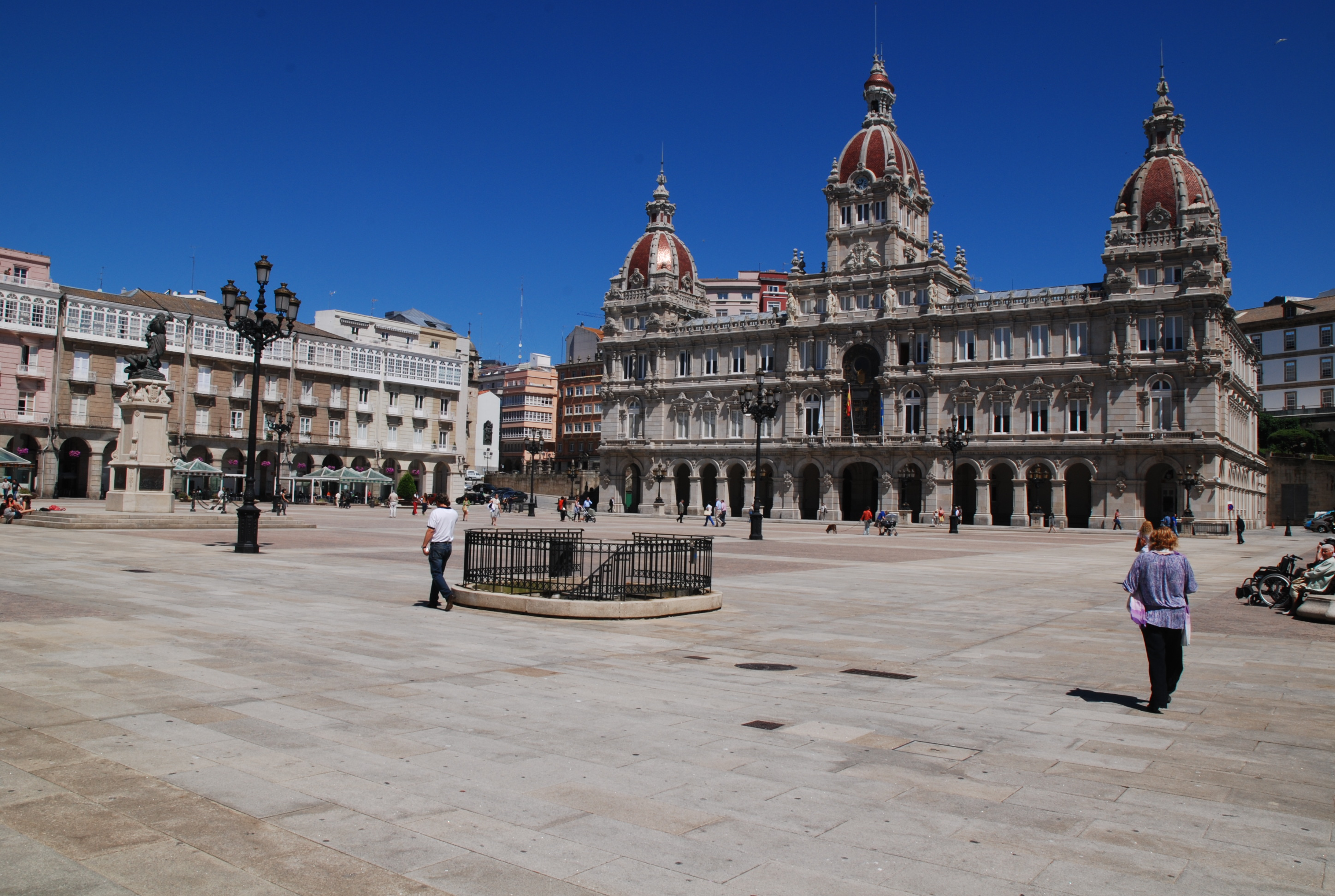 Plaza María Pita